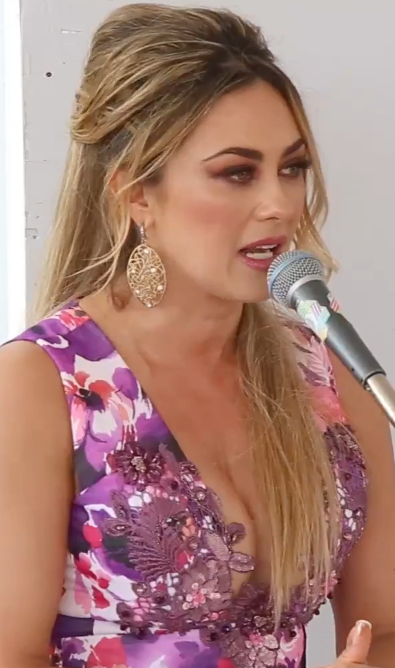 GradoCeroPress ARACELI ARAMBULA